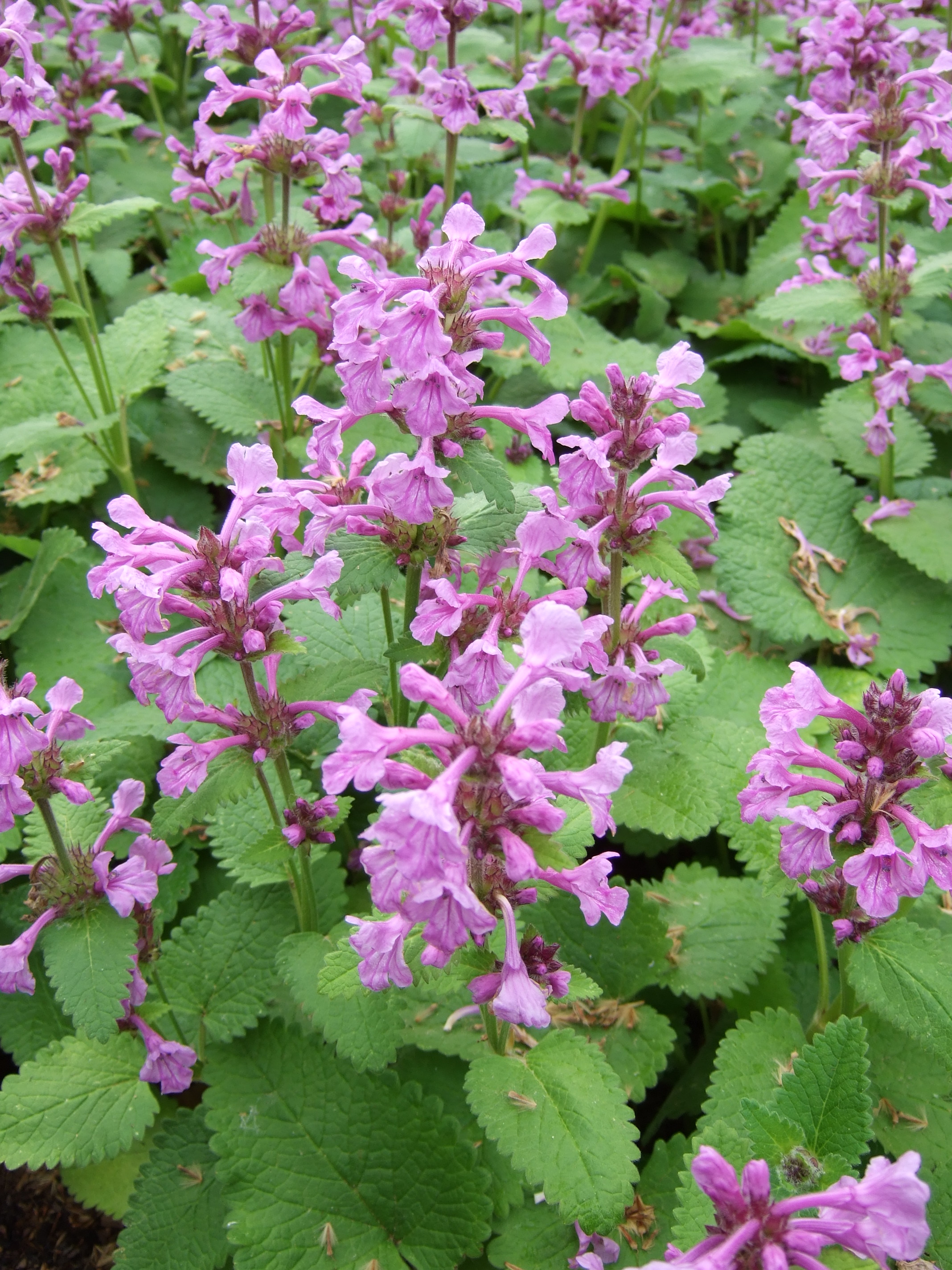 Stachys macrantha 'Superba'